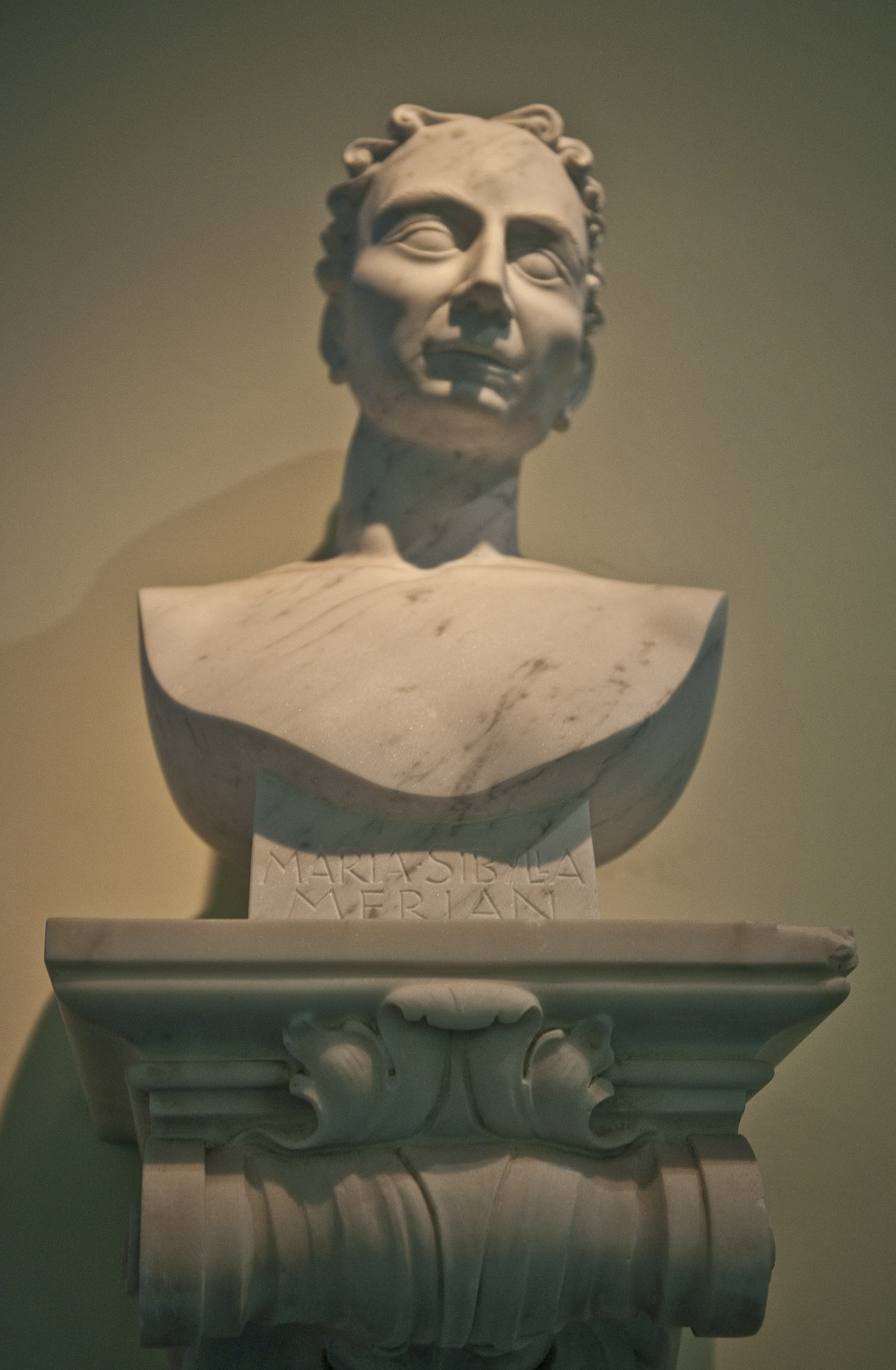 Maria Sibylla Merian (1647–1717), deutsche Biologin und Künstlerin. - Büste von Georg Hüter (2003) aus Carrara-Marmor im Senkenberg Museum, Frankfurt. Beschriftung: Von Maria Sibylla Merian ist lediglich ein Altersbildnis bekannt, ein Kupferstich des Jakob Houbraken. Er geht zurück auf eine lavierte Federzeichnung ihres Schwiegersohnes Georg Gsell. Das von Jakob Houbraken (1698 Dordrecht - 1780 Amsterdam) gestochene Bildnis erschien erstmals 1717 in der holländischen Ausgabe des "Raupenbuchs". Es bildet die Grundlage für diese Büste, die anläßlich der Einrichtung dieses Saales bei dem Bildhauer Georg Hüter in Auftrag gegeben wurde.